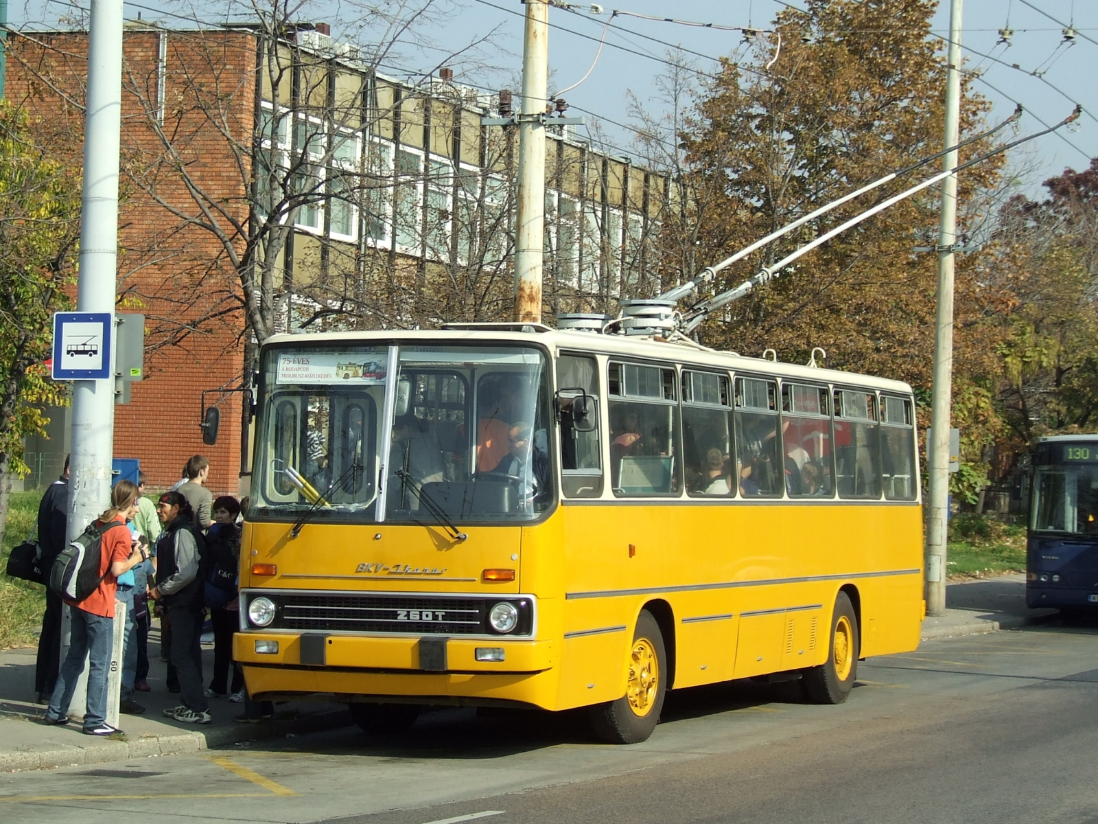 A BKV Ikarus 260T típusú trolibusza a budapesti trolibusz közlekedés 75. évfordulójának alkalmából tartott nyílt nap idején. Stadionok és a Pongrác úti telep között szállított utasokat.